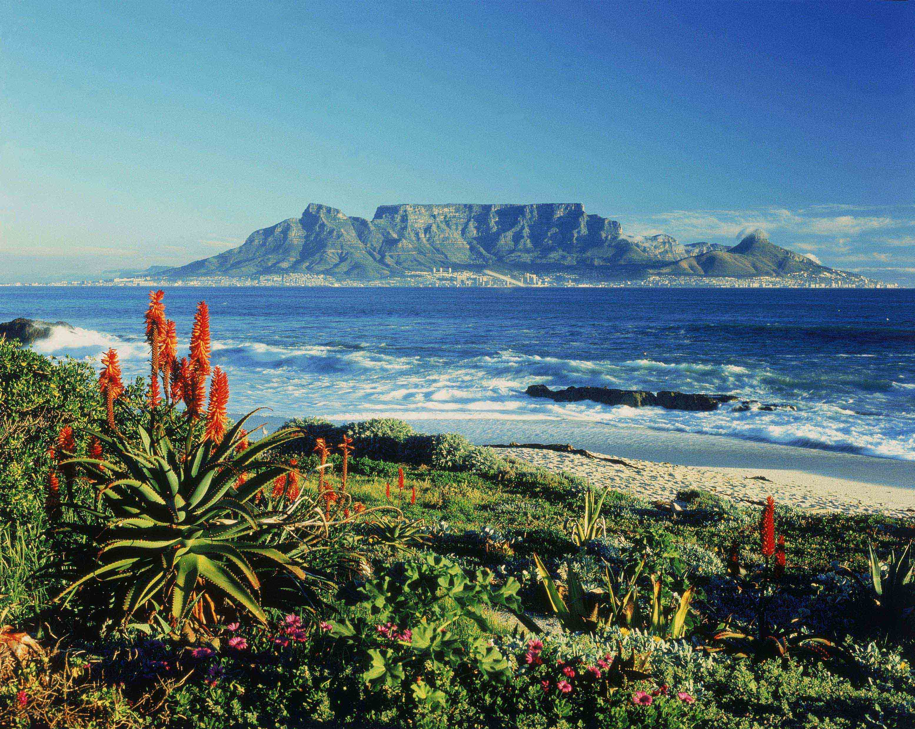 Table Mountain in South Africa . Vue de Western Cape en Afrique du Sud.